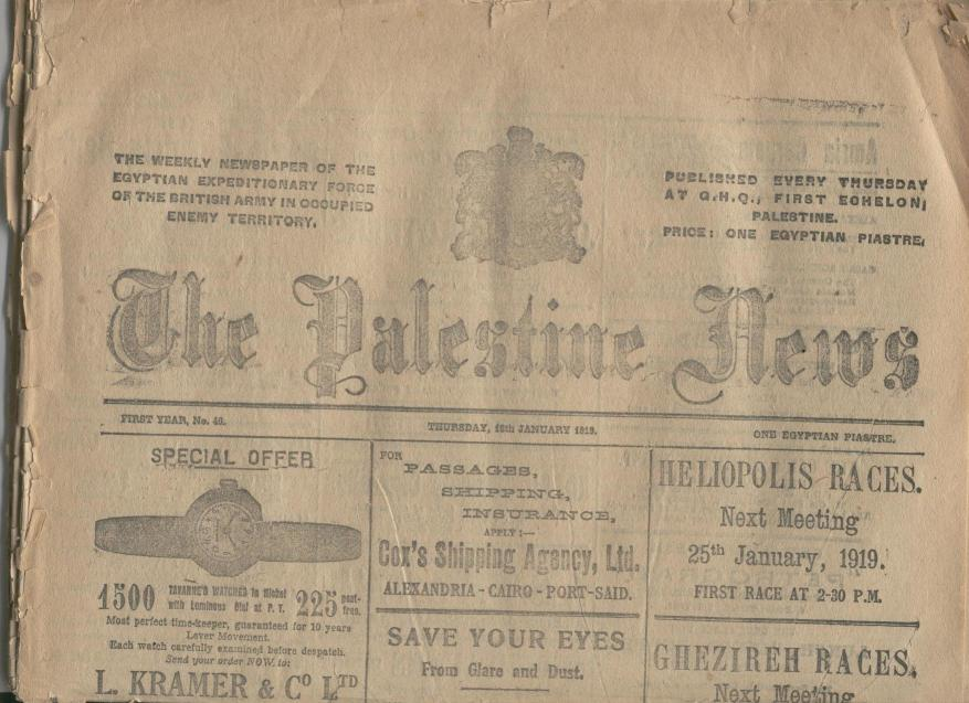 כותרת העיתון מתאריך השבע עשרה בפברואר שנת 1919, נסרקה מתוך ארכיון העיתון.